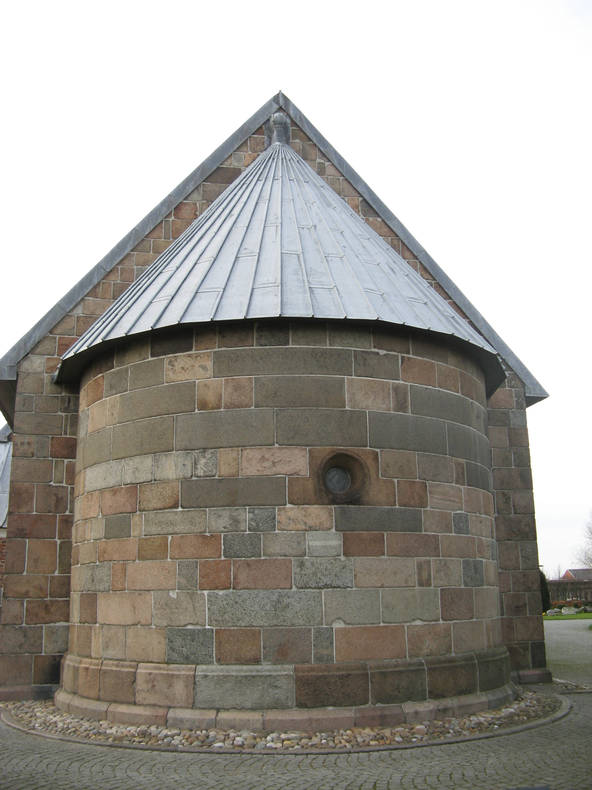 Jerne Kirke, Jerne sogn, Esbjerg kommune (former: Skads Herred, Ribe Amt). Apsis set fra syd.